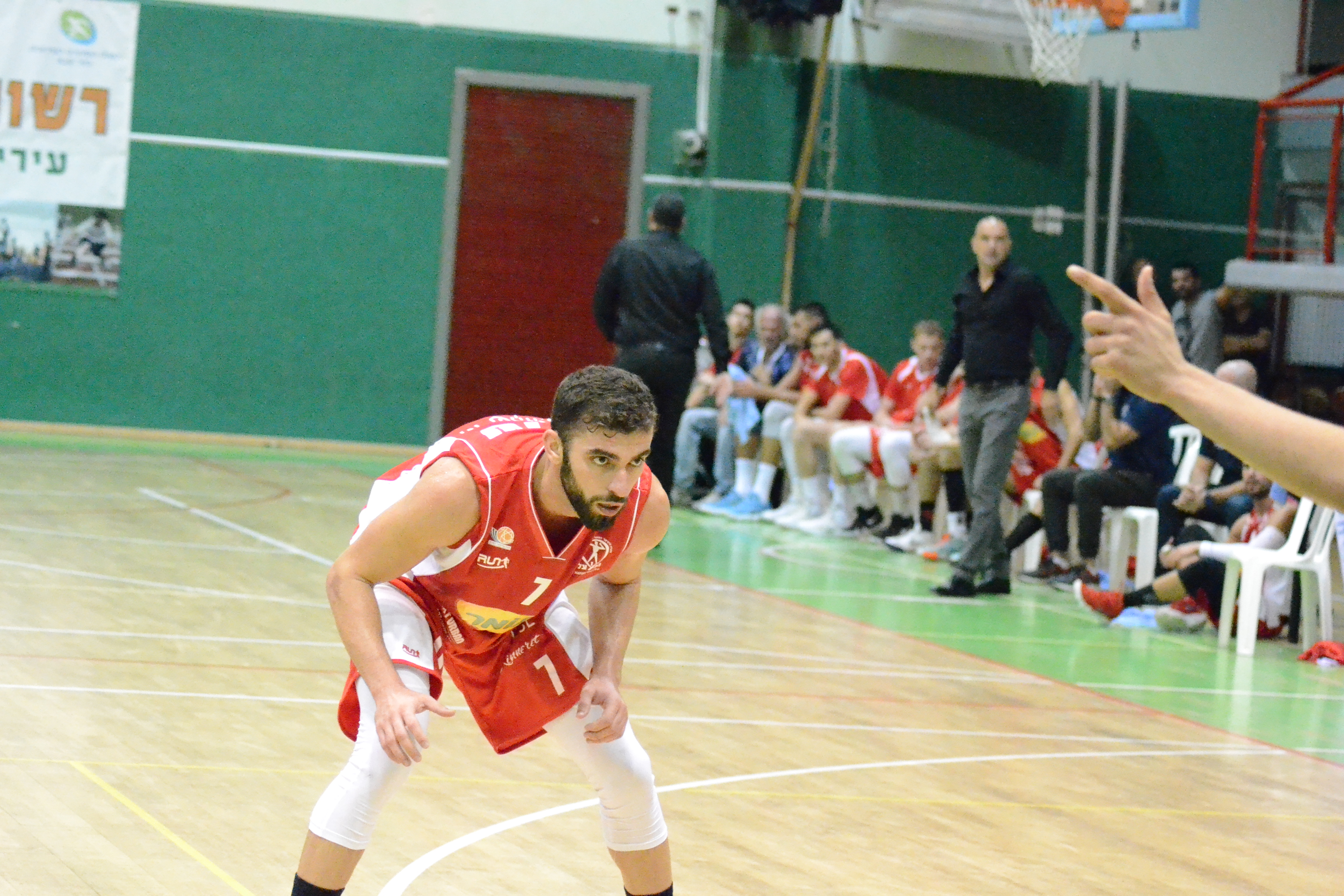 נאור שרון במדי הפועל חיפה